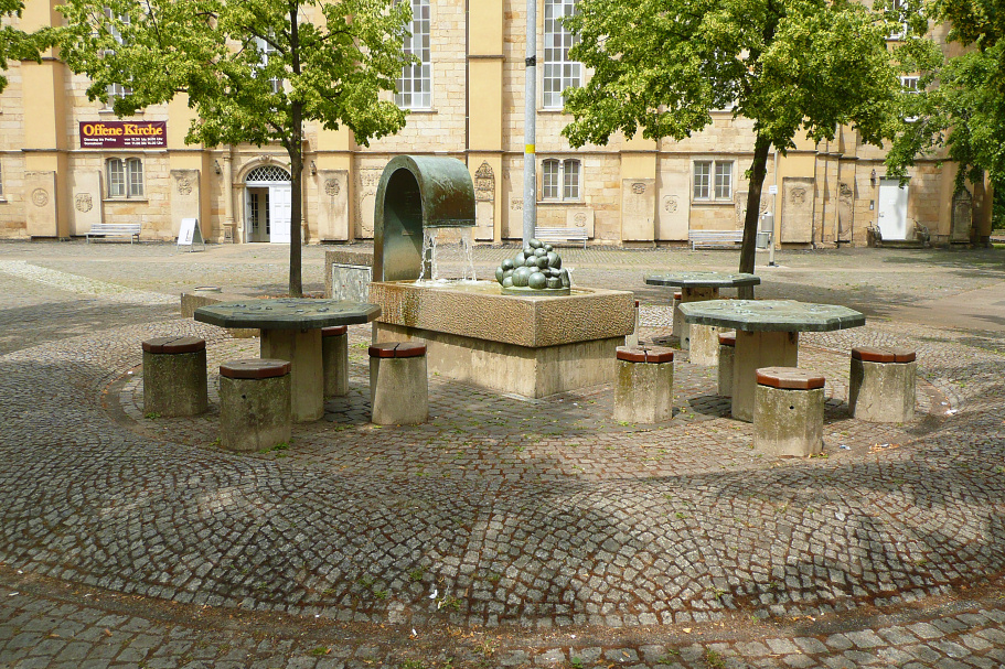 Neustädter Marktbrunnen Hannover